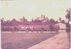 Bangunan Sekolah pada tahun 1960